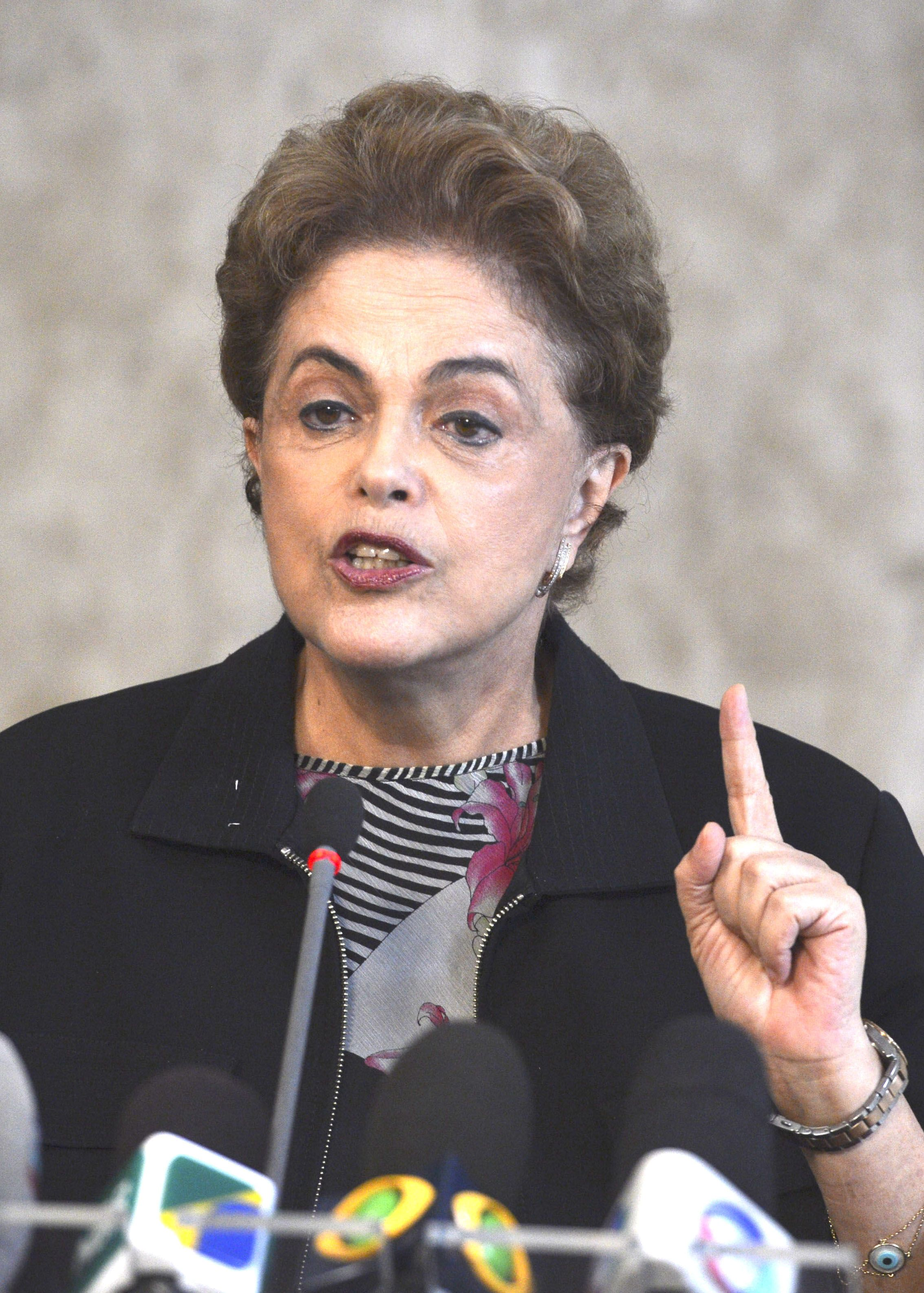 A presidente Dilma Rousseff afirmou, em entrevista coletiva, diz que não vai renunciar ao cargo.